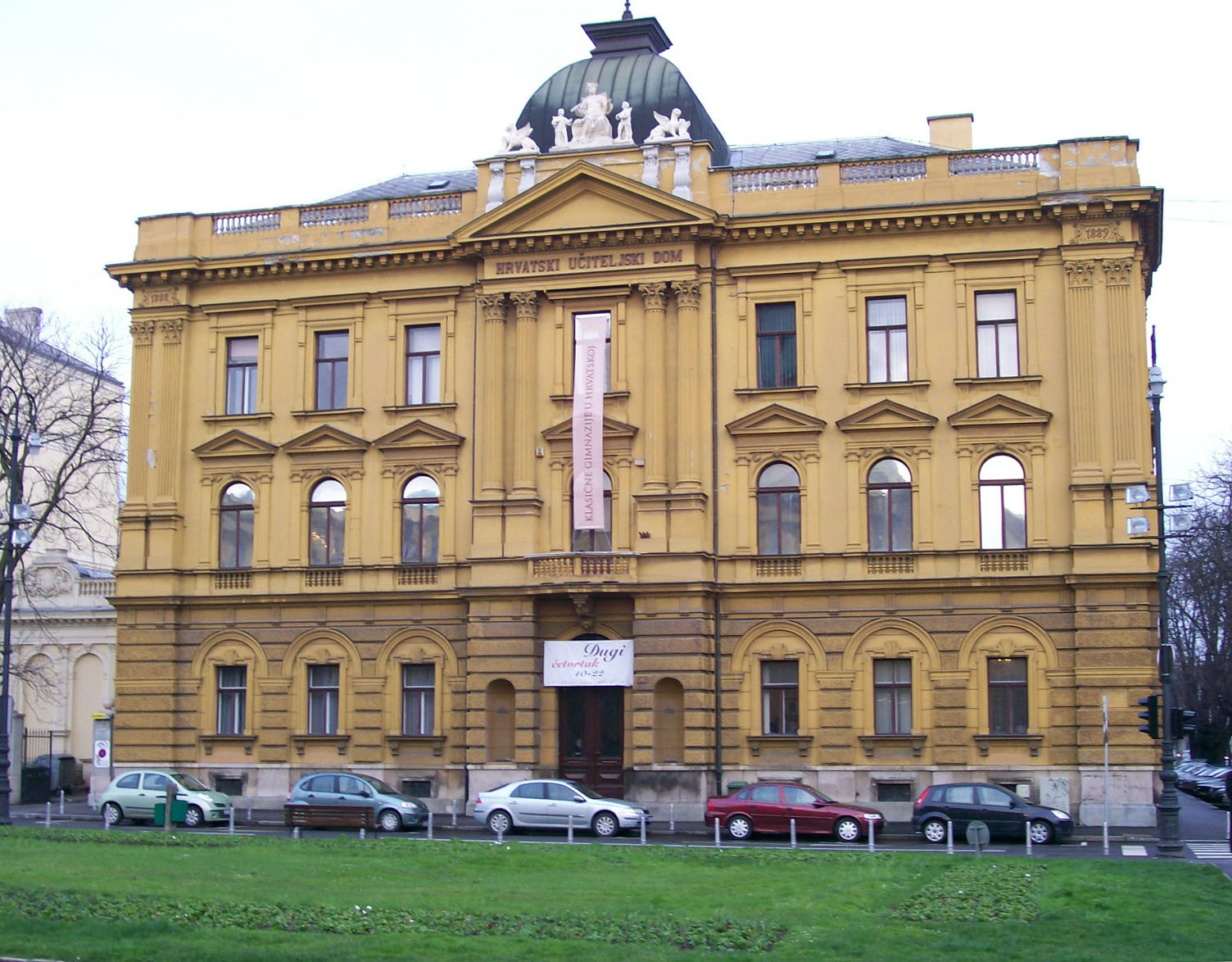 Hrvatski školski muzej, Zagreb